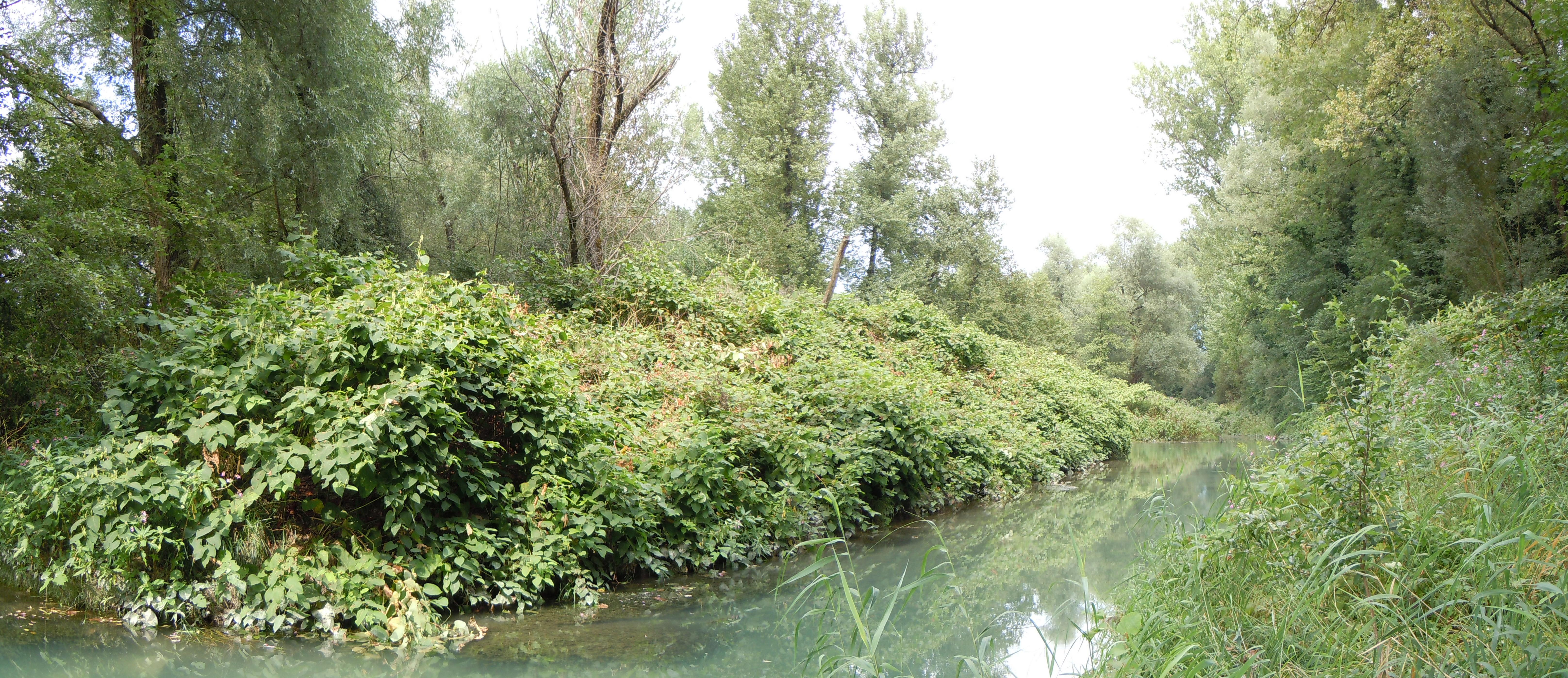 Yenne- Bord du Rhône: Lône envahie par des Renouées du Japon, Znieff fu Haut-Rhône de la Chautagne aux chutes de Virignin . Savoie, France